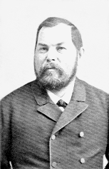 Prof. Jan Czubek.